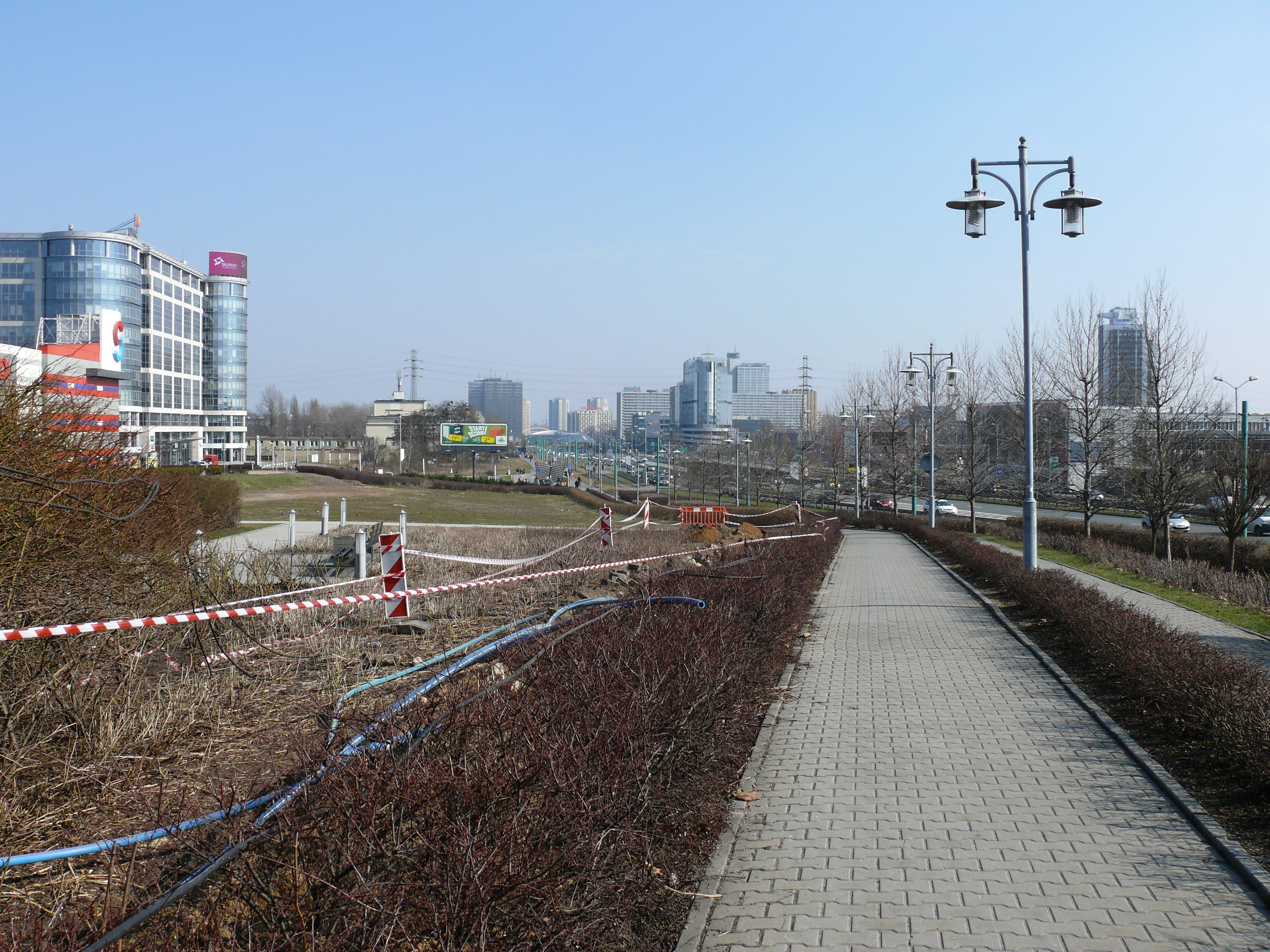 Blick auf das Zentrum von Kattowitz vom Silesia City Center an der Ulica Chorzowska aus.